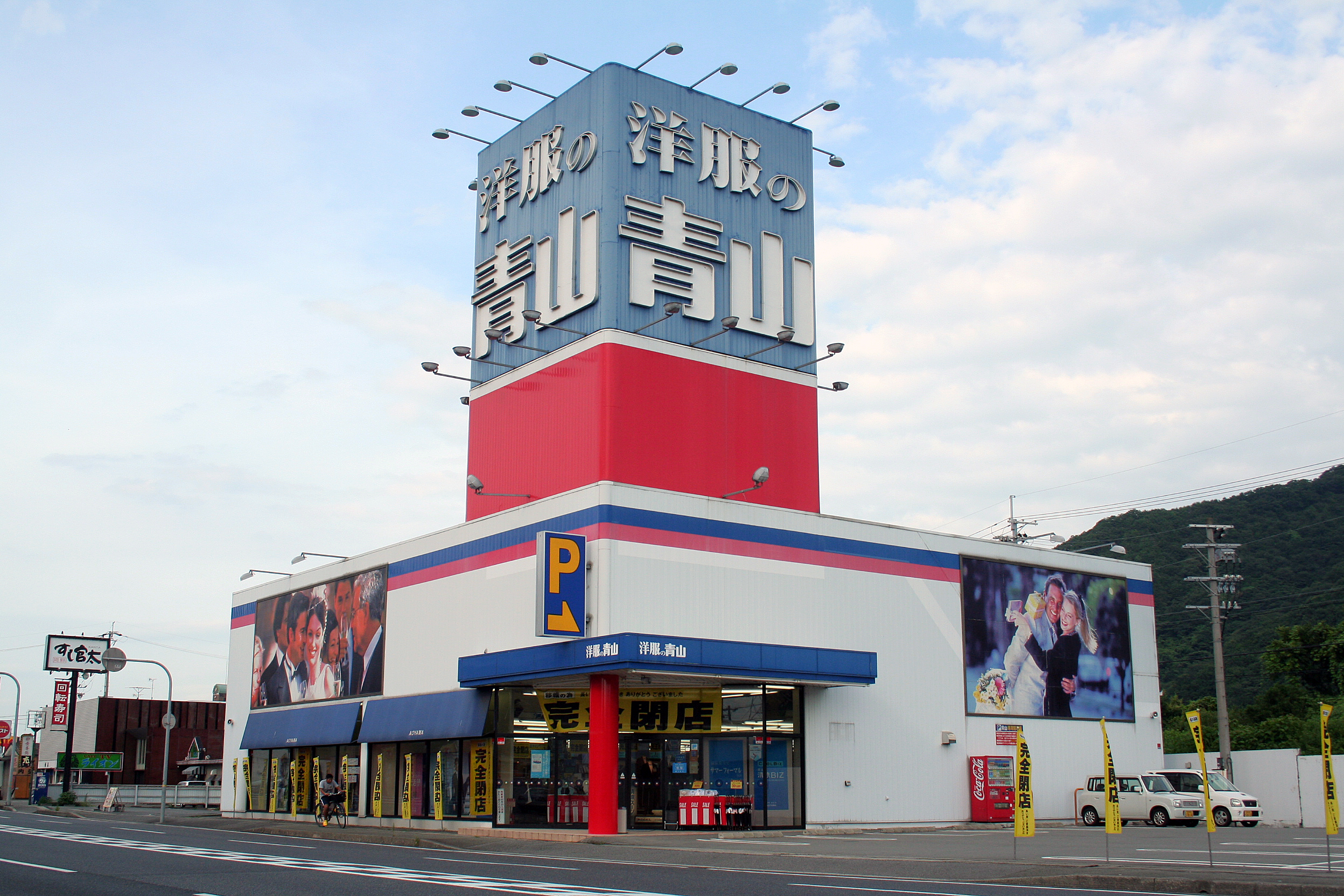 主に姫路市内の店舗の画像。そして飲食物。 洋服の青山姫路砥堀店。